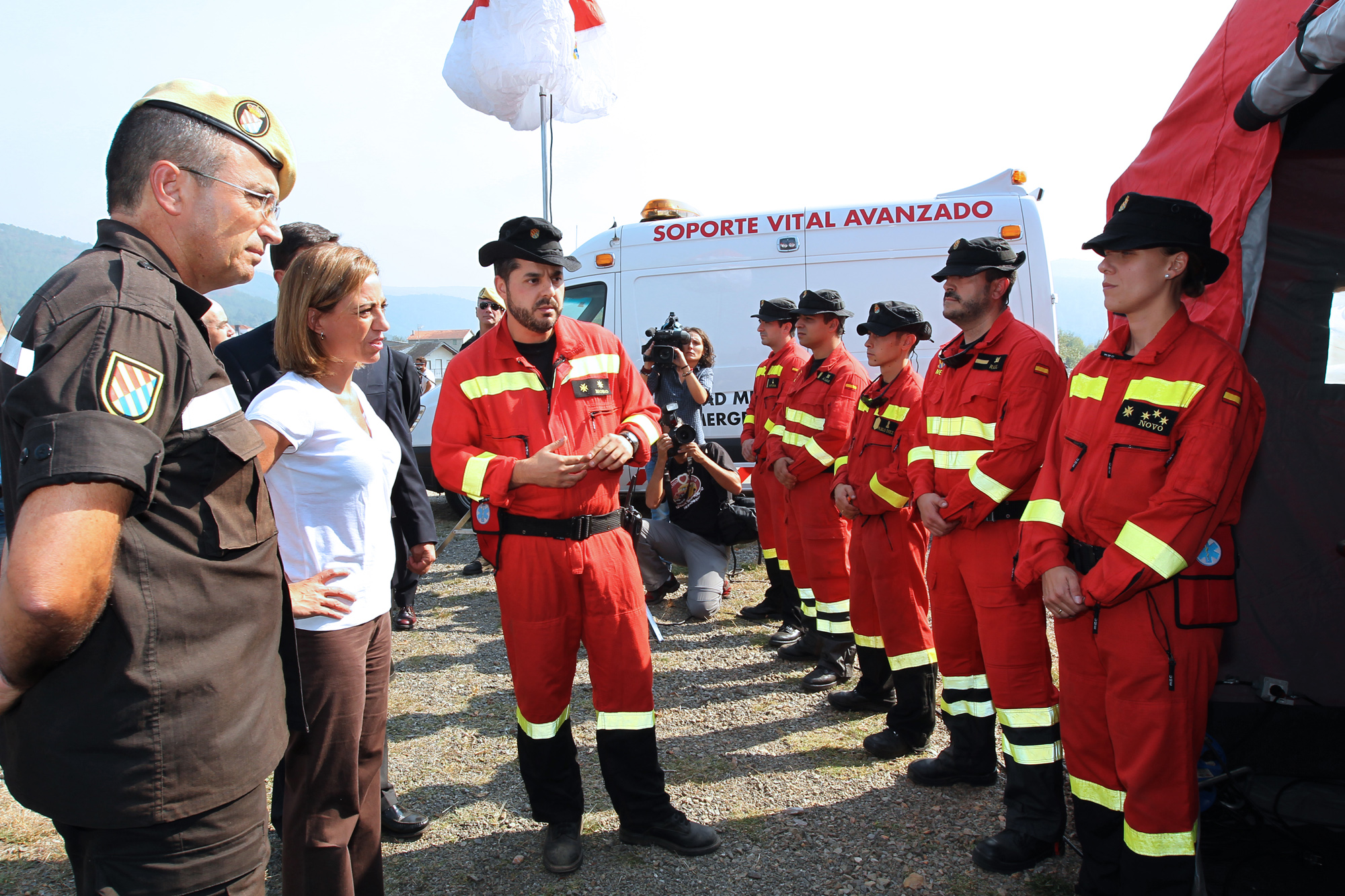 A ministra de Defensa, Carme Chacón saúda a membros da UME despregados en Laza.